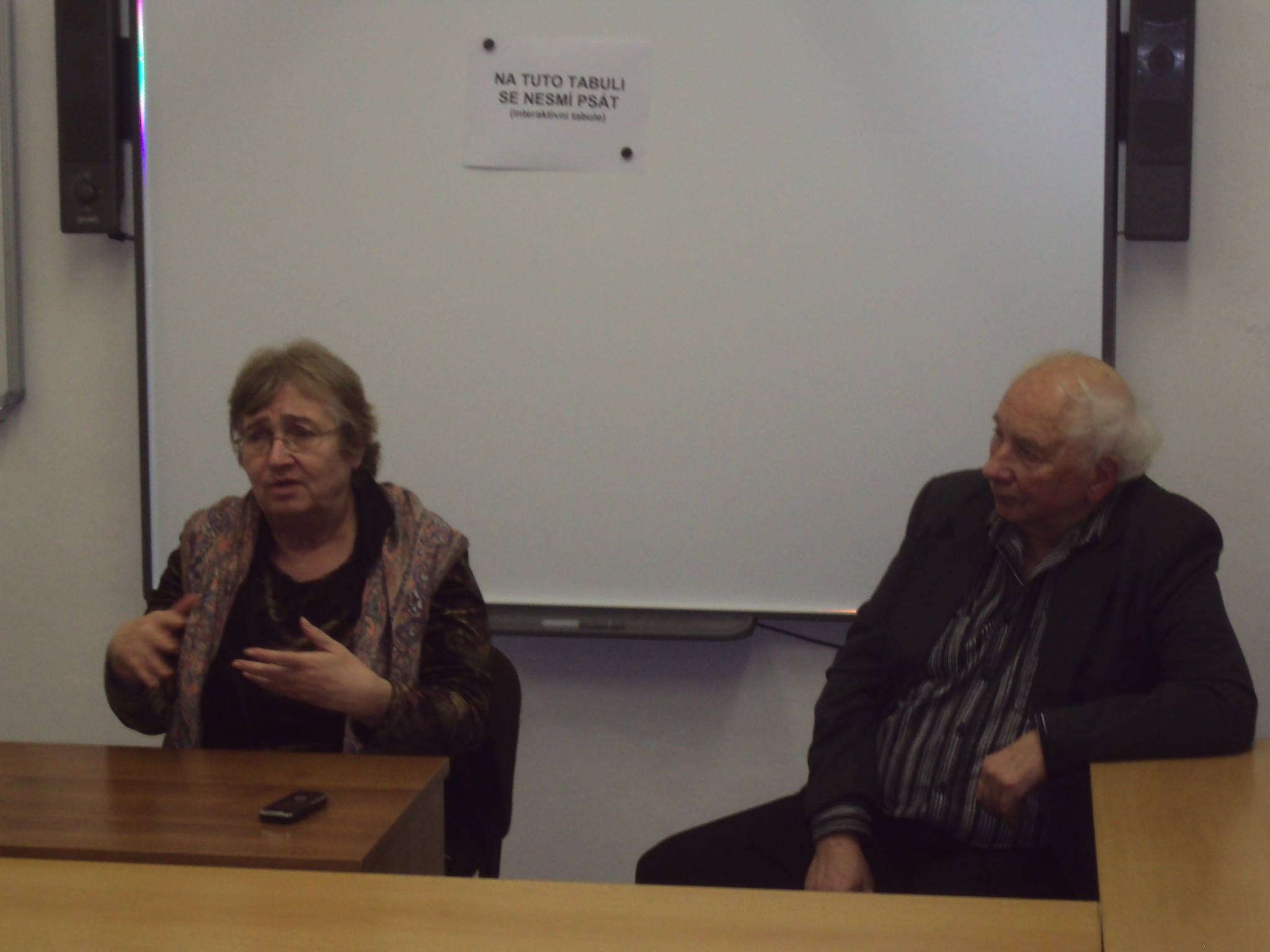 Petruška Šustrová a prof.Pokorný, exstarosta města na besedě v České Lípě